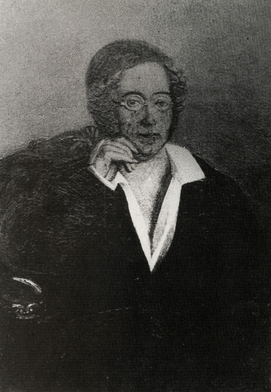 Der Maler, Schriftsteller, Dichter und Mainzer Jakobiner Nikolaus Müller.